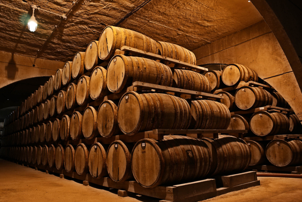 barriles de pisco en el valle de Elqui